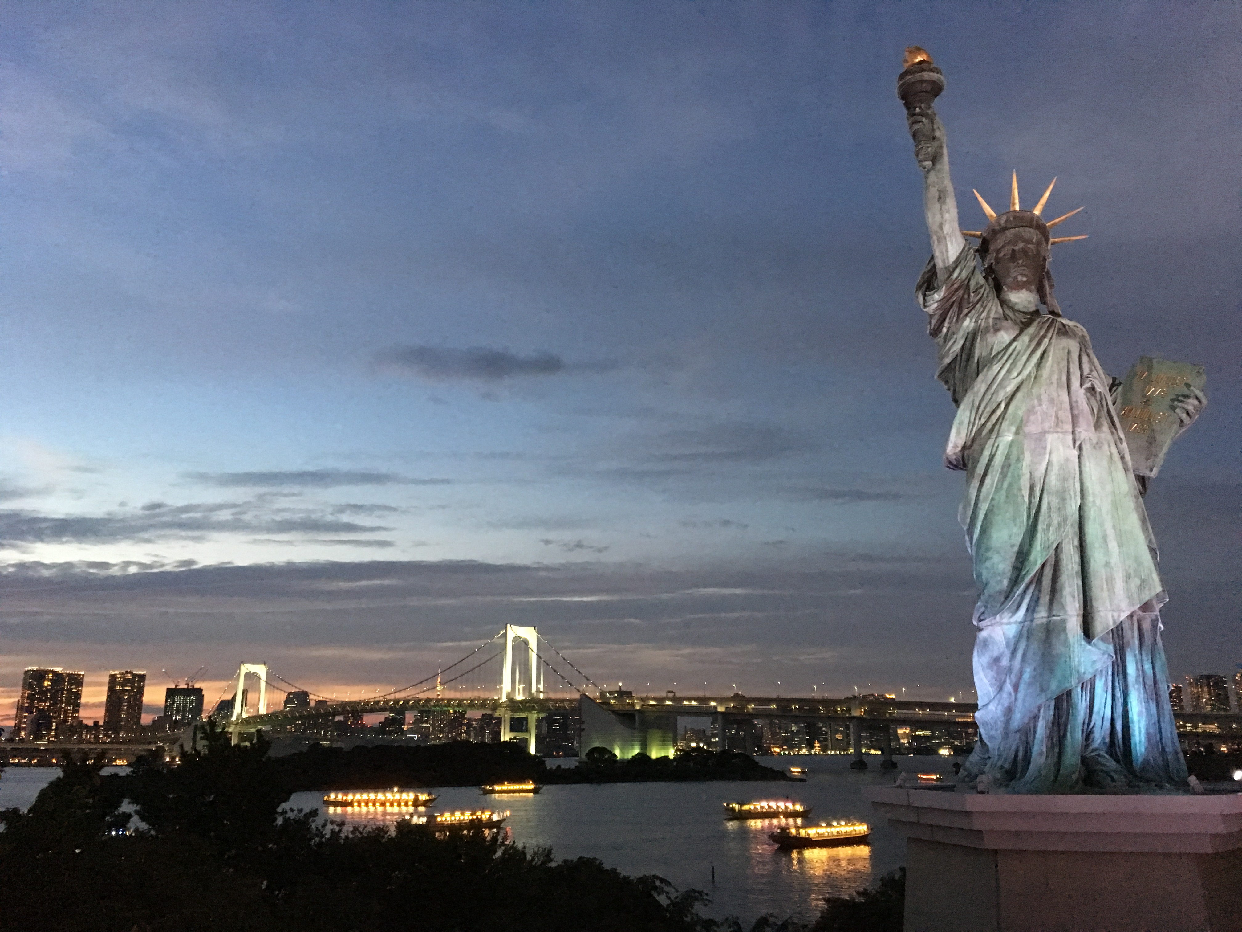 Réplica de la estatua de la Libertad, localizada en Odabia -la isla artficial en la bahía de Tokio- Japón. Detrás se puede ver el Rainbow Brigde.